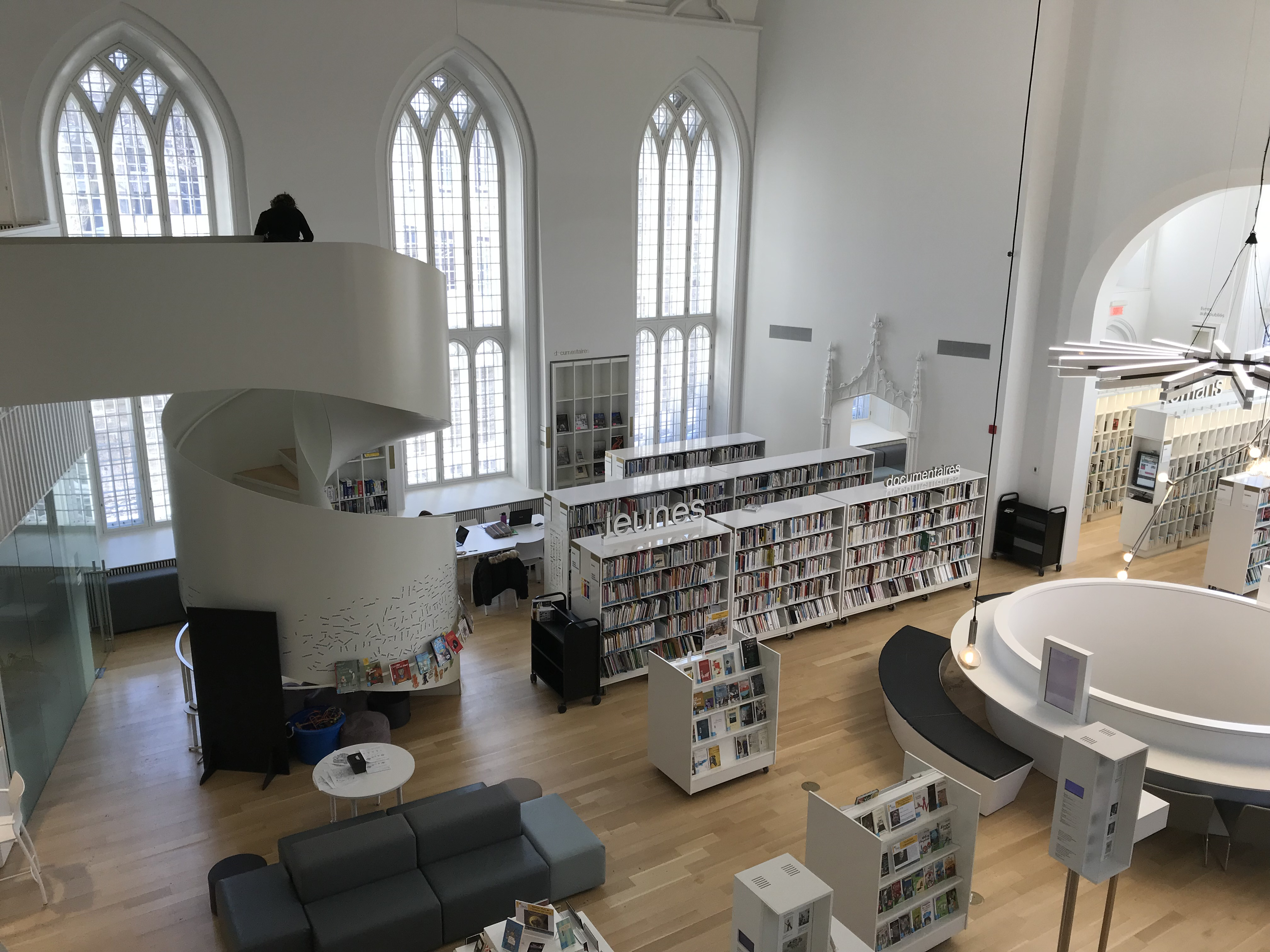 Maison de la littérature, février 2019.